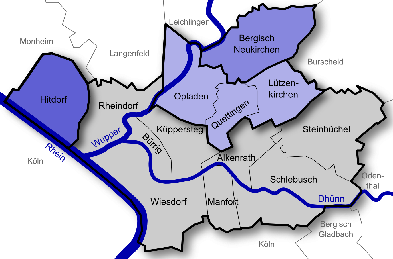 Eingemeindungen zu Leverkusen 1975: Alt-Leverkusen (seit 1930) in grau, Hitdorf, Bergisch Neukirchen und Opladen (mit Lützenkirchen und Quettigen) in blau wurden 1975 eingemeindet.